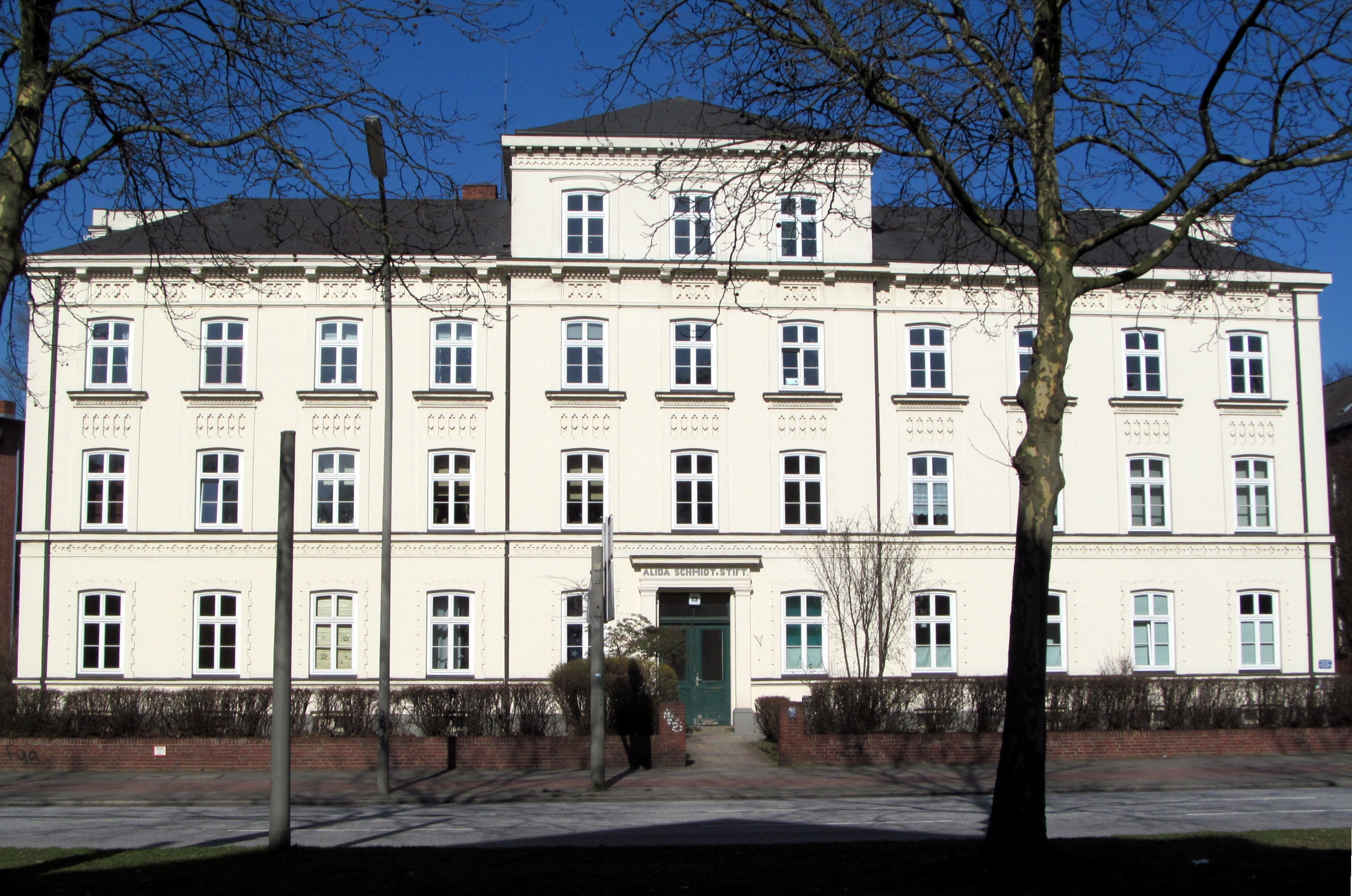 This is a photograph of an architectural monument.